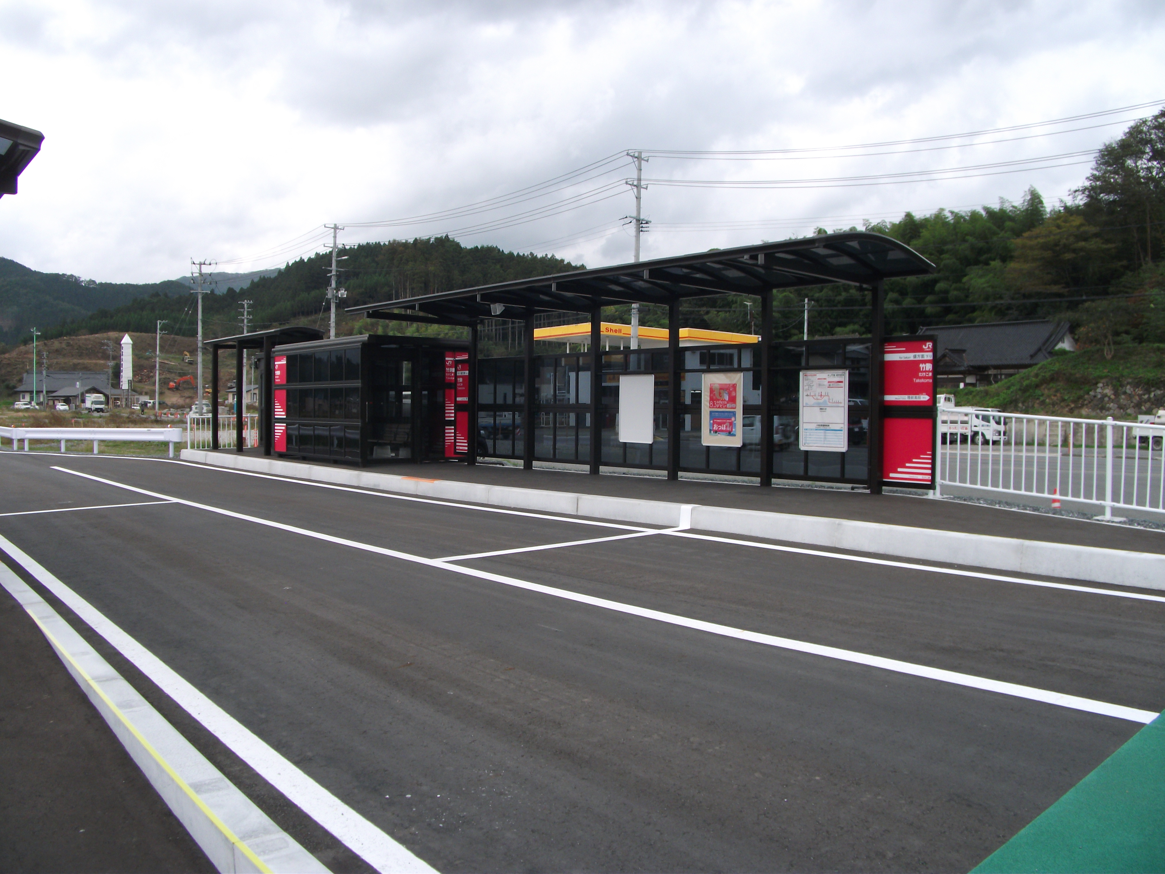 岩手県陸前高田市、大船渡線竹駒駅。陸前矢作行きホームから陸前高田行きホームを望む